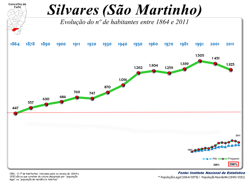 Censos 1864/2011